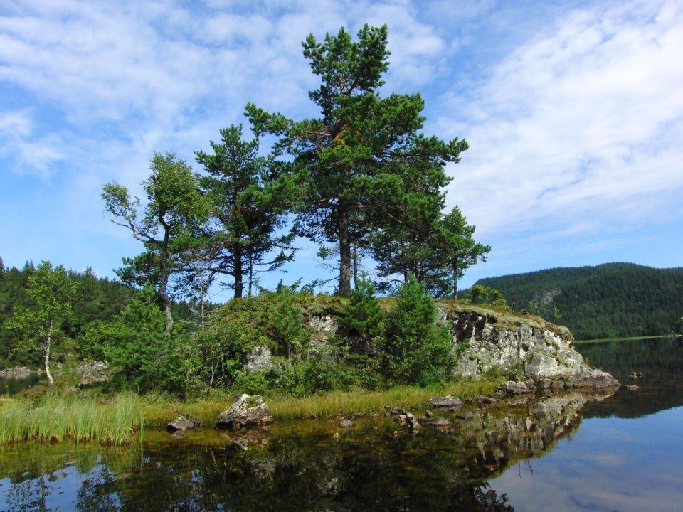 Gjeldbukkholmen på Tørstadvatnet